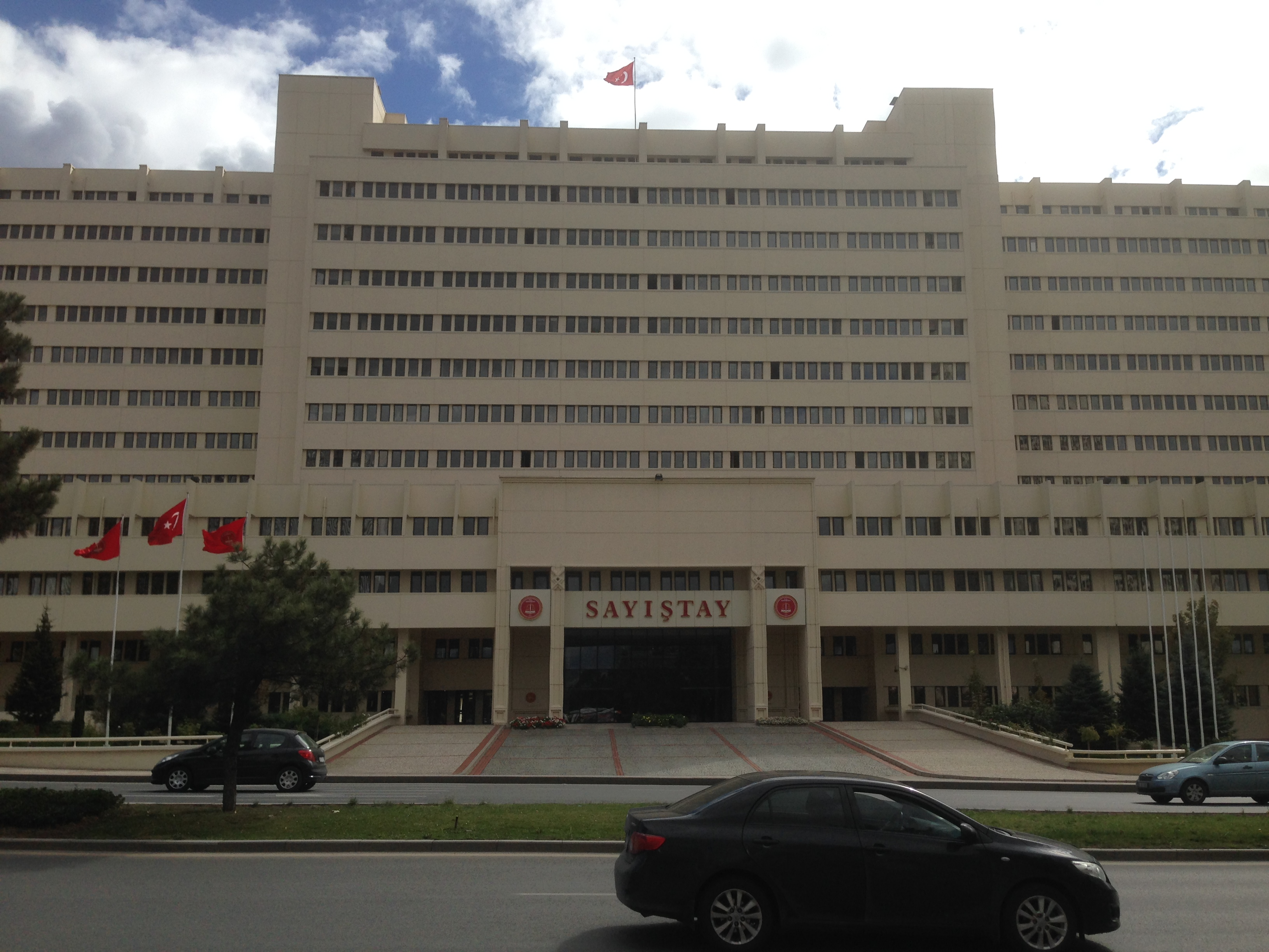 Türkiye Sayıştay Başkanlığı Binası, Ankara